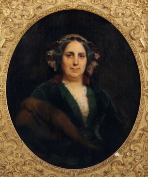 Paméla Marqfoy (1795-1876), épouse du comte Achille Treilhard